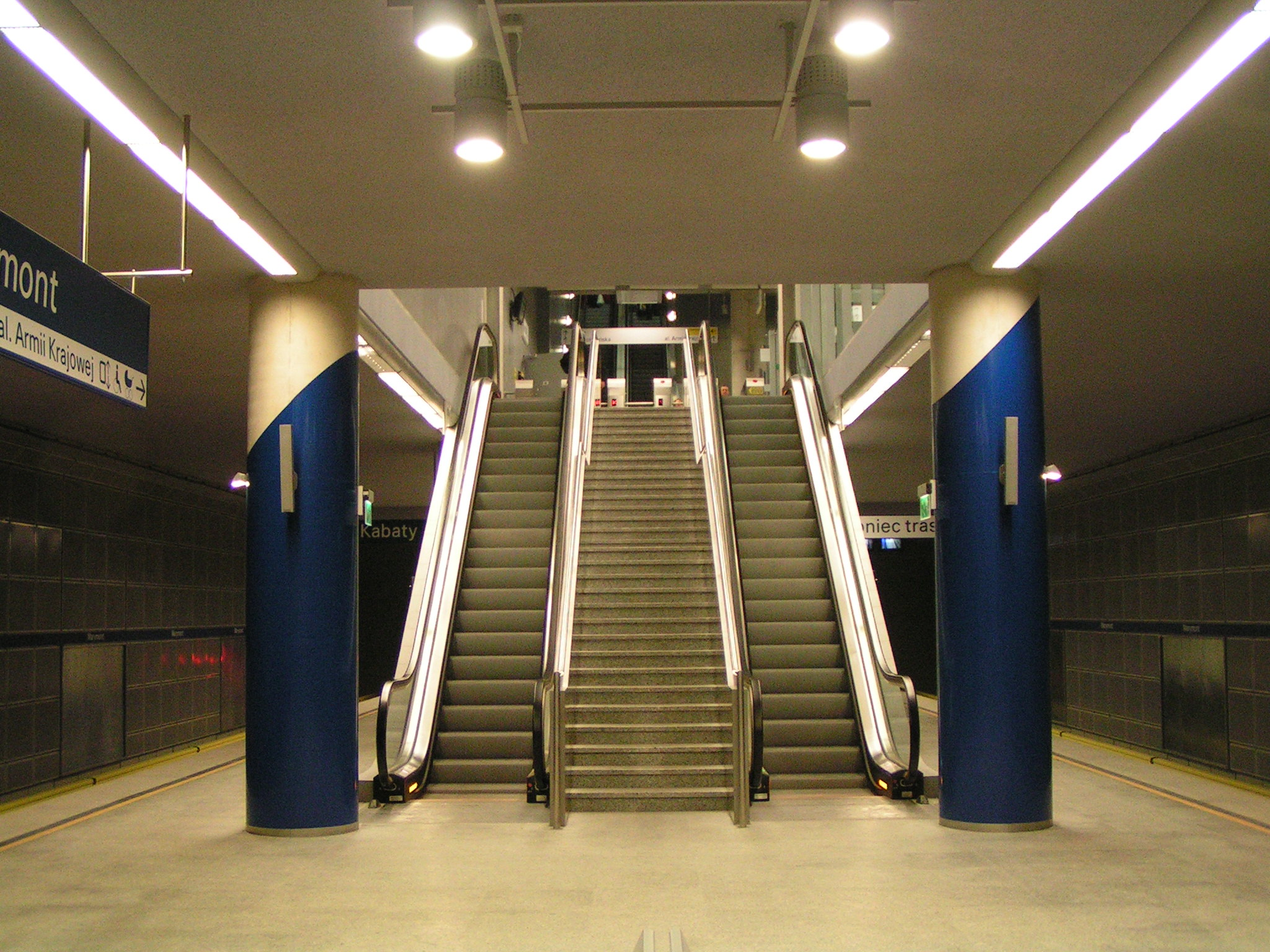 Stacja Marymont